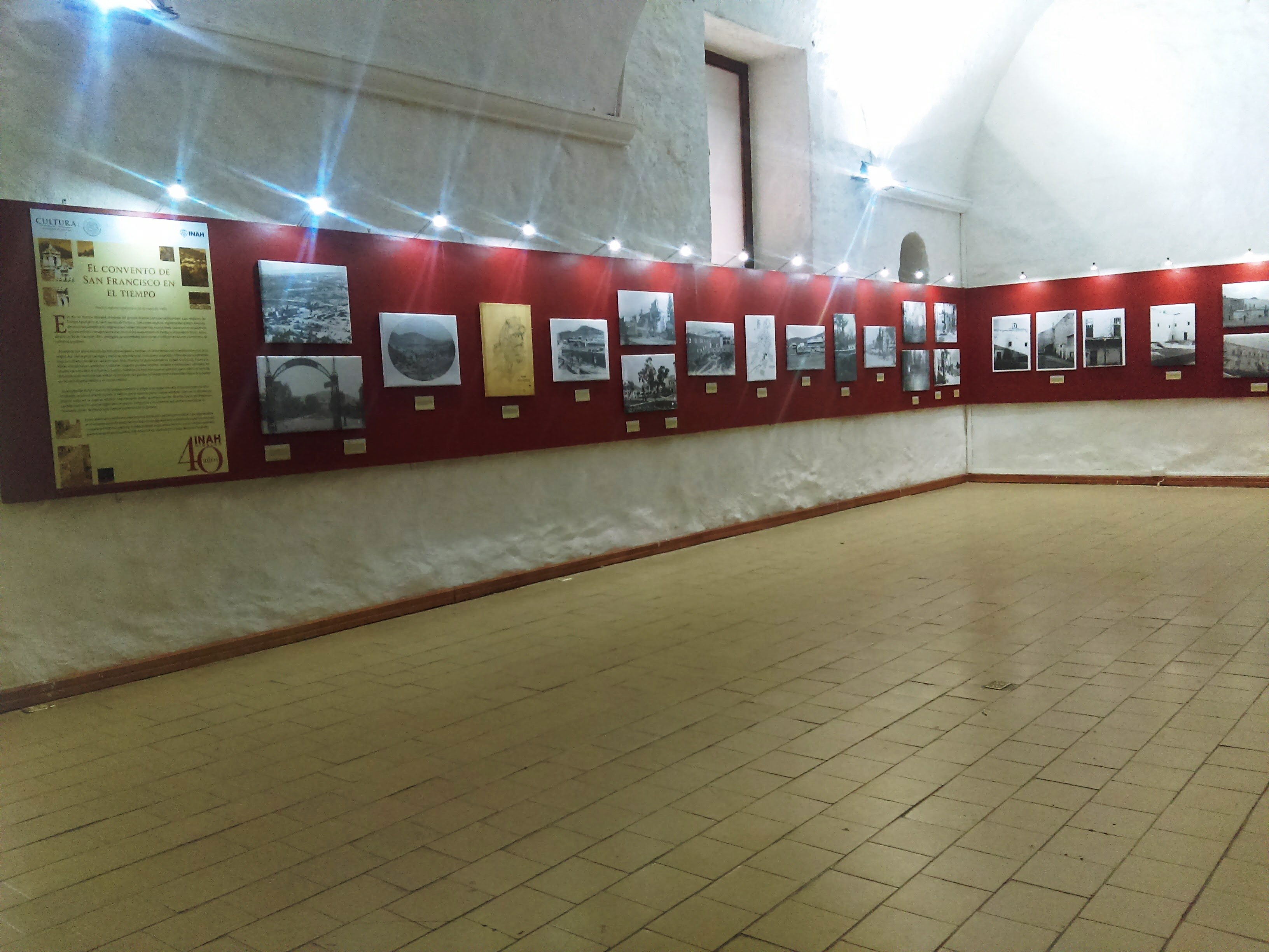 Exhibición Convento de san Francisco en el tiempo.